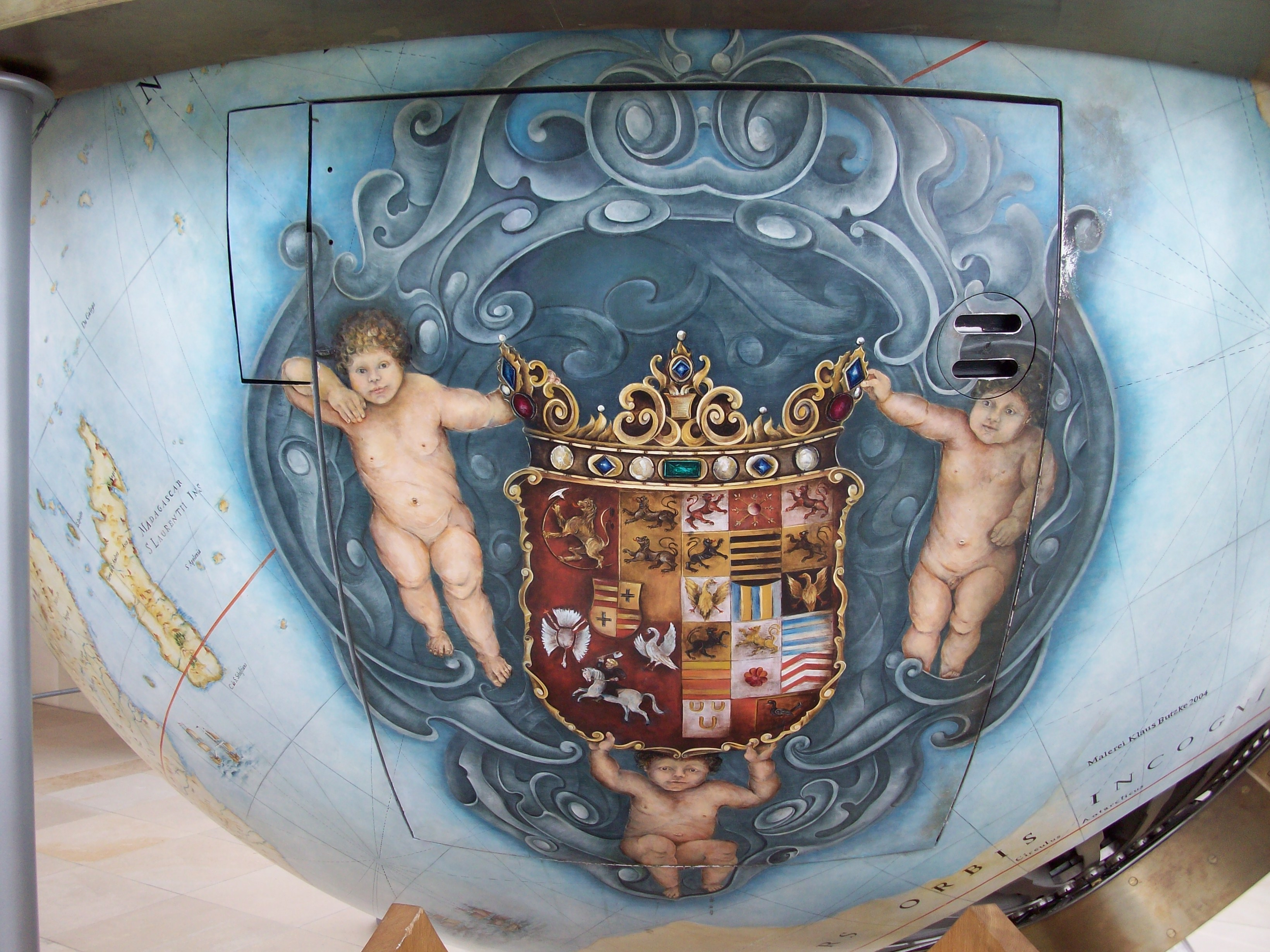 Gottorfer Riesenglobus im Globusmuseum Schloß Gottorf, Schleswig, Einstiegstür mit Wappen